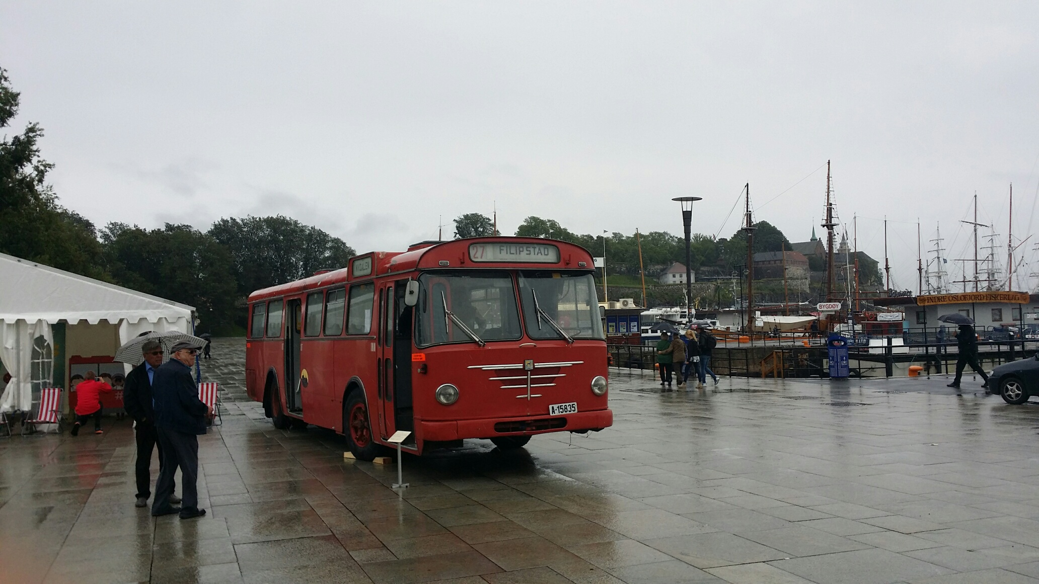 Sporveismuseets Bussing A-15835 under et arrangement på Rådhusplassen i Oslo.